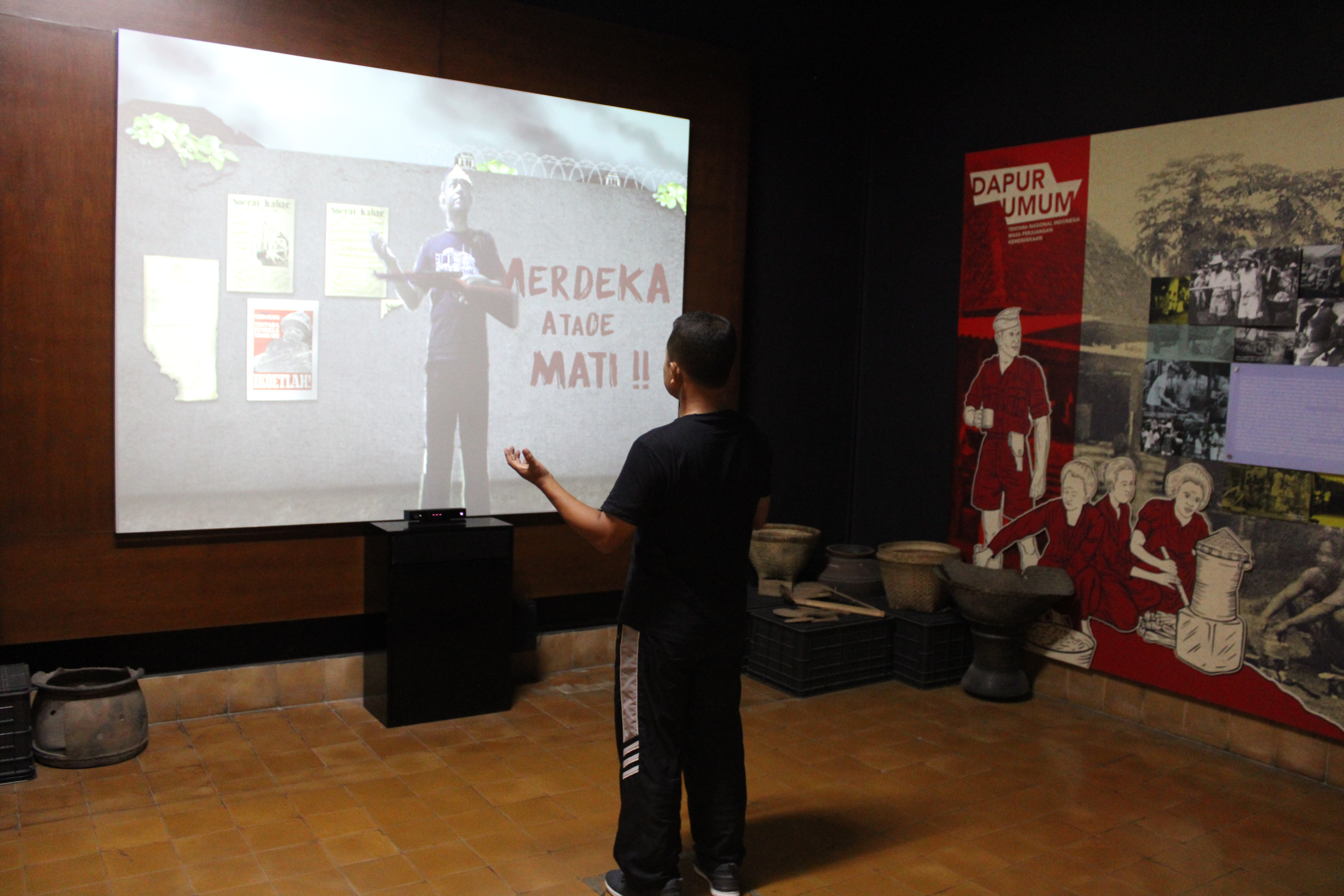 Salah satu permainan yang dapat ditemukan di Museum TNI AD. permainan ini akan membawa pengunjung merasakan berada dalam kondisi dapur umu, markas komando dan tim kesehatan. Gerakkan tangan dan tubuhmu maka sensor akan menampilkan gambar anda di layar besar.